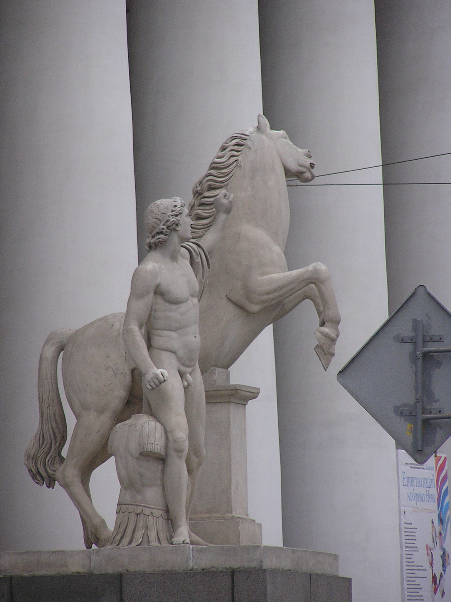 Санкт-Петербург. Конногвардейский манеж. Скульптура Диоскура (копия статуи в Риме) Скульптор: П. Трискорни. Скульптура установлена в 1817 году (копия статуи в Риме).